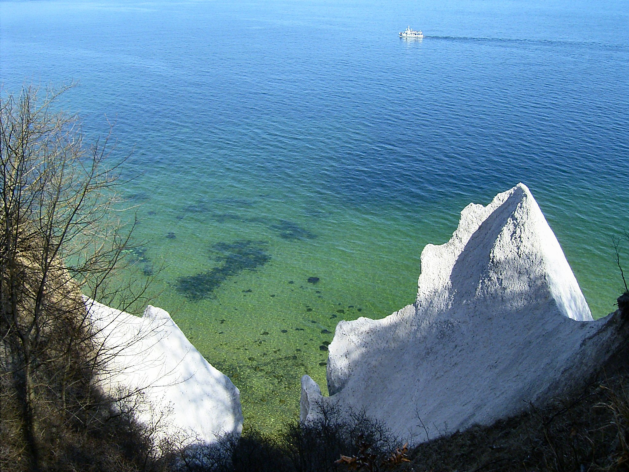 Die Wissower Klinken – eine Kreideformation im Nationalpark Jasmund auf der Insel Rügen vor dem großen Küstenabbruch, der am 24. Februar 2005 50.000 m³ Kreide ins Meer riss